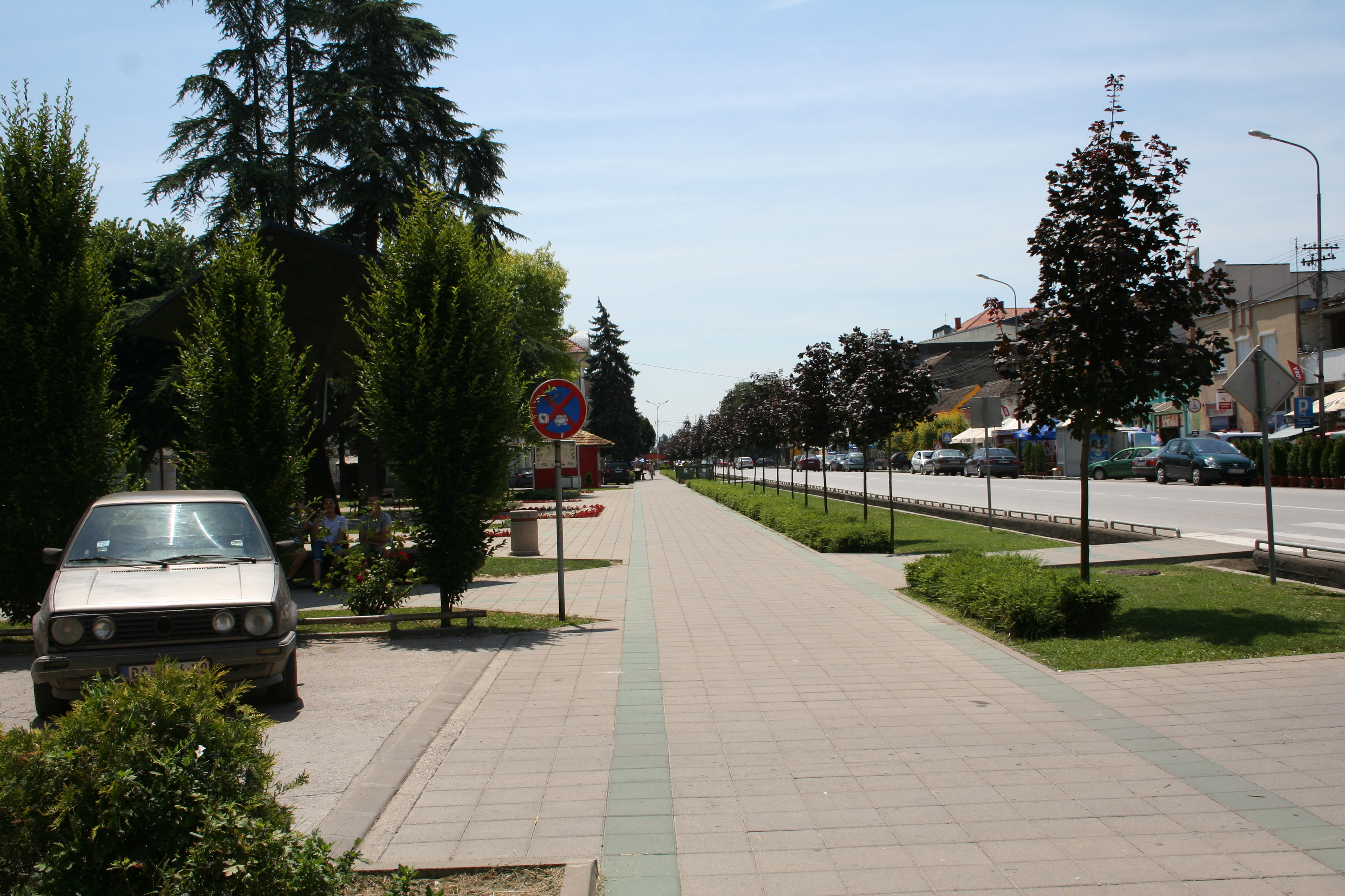 Ulica, Bogatić